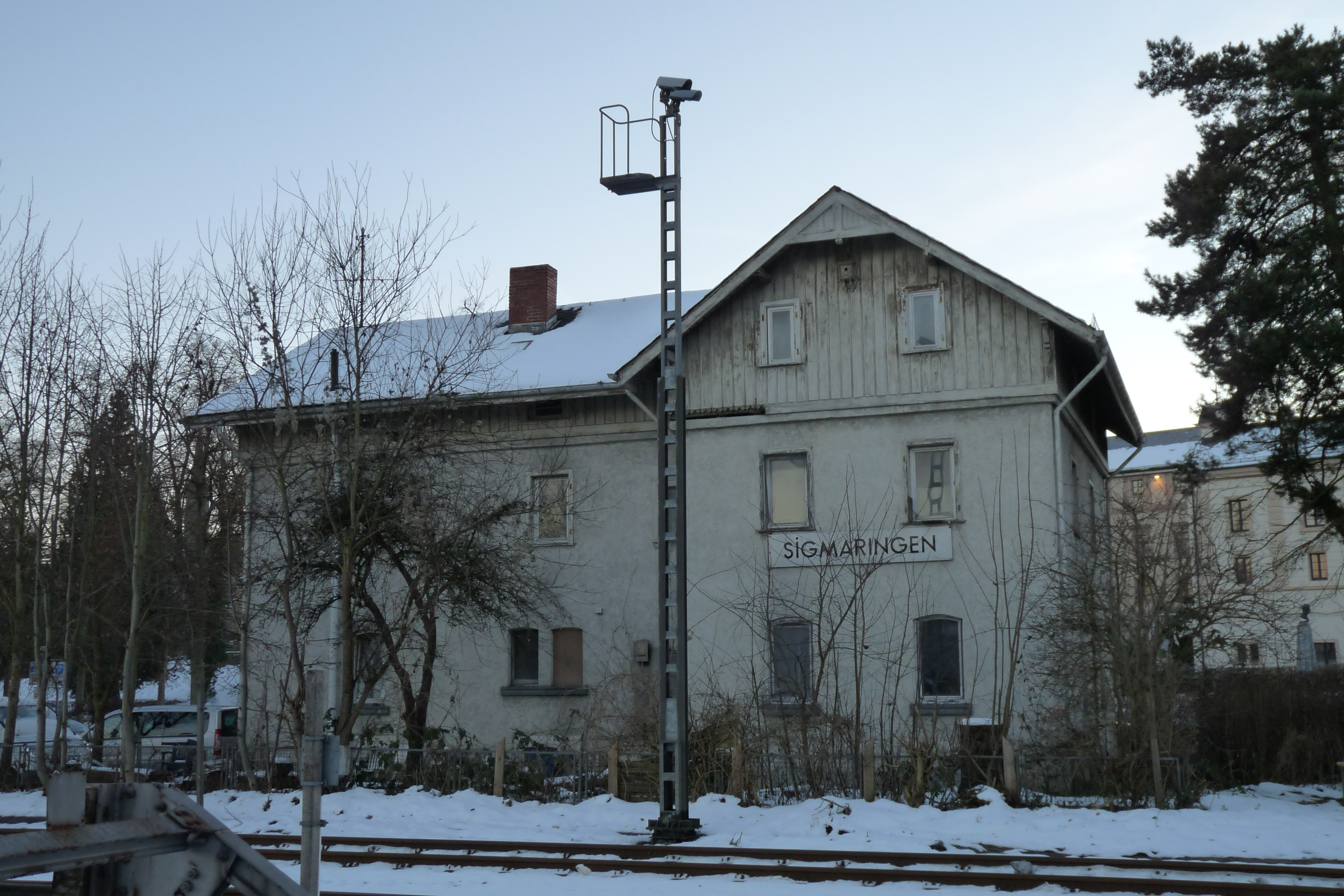 Baudenkmal Bahnhofstr. 1, Sigmaringen, Deutschland